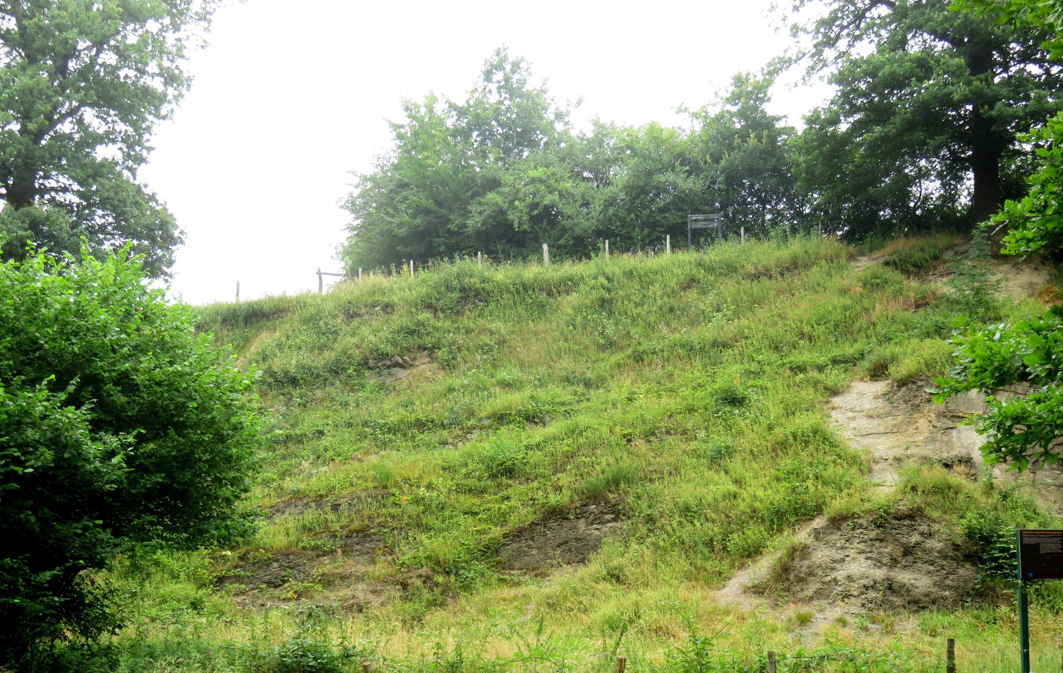 Heimansgroeve in Zuid-Limburg